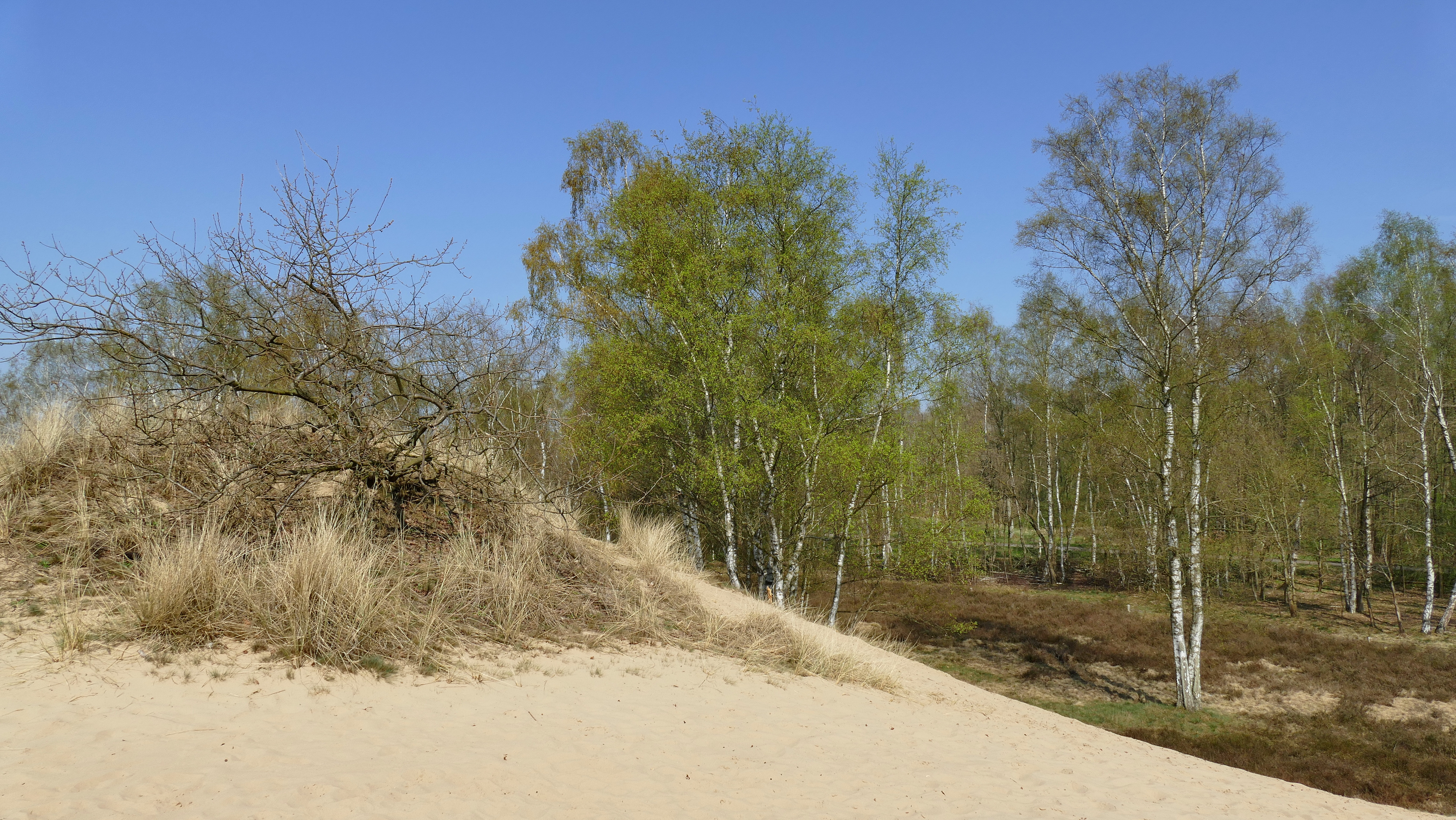 Im Hamburger Naturschutzgebiet Boberger Niederung sind die Dünen eine große Attraktion, da sie betreten werden dürfen. Nur in den abgesperrten Bereichen entwickelt sich die typische Dünenvegetation. Dieser Bereich des NSG gehört auch in das FFH-Gebiet Boberger Düne und Hangterrassen.